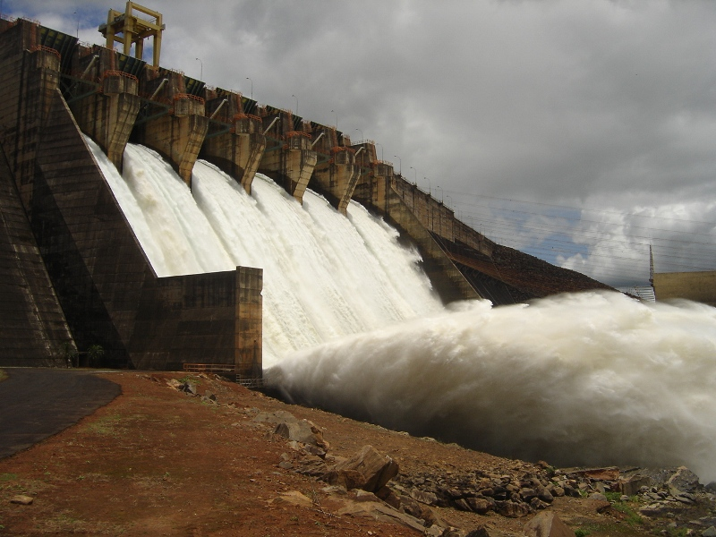 Comportas abertas da Represa de Itumbiara, pertencente a Furnas Centrais Elétricas SA, localizada no Município de Araporã, na divisa de Minas Gerais e Goiás, sobre o Rio Paranaiba